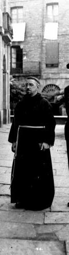 Aita Donostia 1930ean.